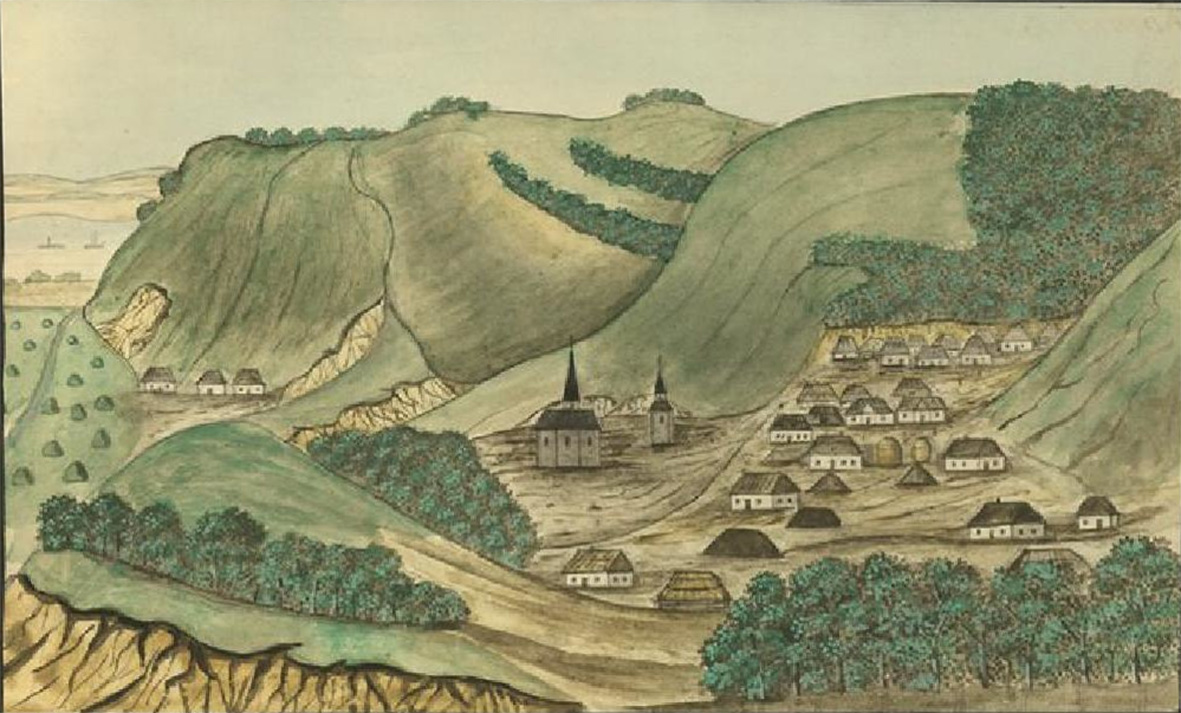 Щучинка. Домінік П'єр де ля Фліз. «Медико-топографічний опис... Київської округи...». Київ, 1854. - с. 586